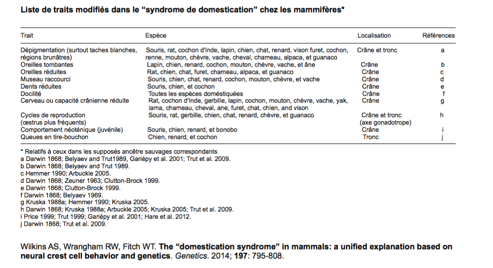 Liste de traits modifés dans le "syndrome de domestication" chez les mamifères; Modifié de Wilkins, A. S., Wrangham, R. W., & Fitch, W. T. (2014). The “domestication syndrome” in mammals: A unified explanation based on neural crest cell behavior and genetics. Genetics, 197(3), 795-808.